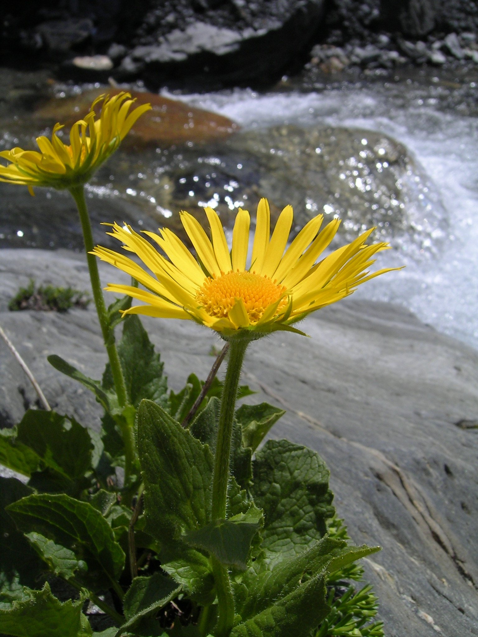 (en) (Doronicum grandiflorum) (de) Grossblütige Gämswurz (Doronicum grandiflorum) Aufnahmeort: In den Bergen, zwischen der Greina-Ebene und dem Greina-Pass (Schweiz). Gestein kalkhaltig. Bearbeitung: GIMP Kontrast angepasst (Kurven)